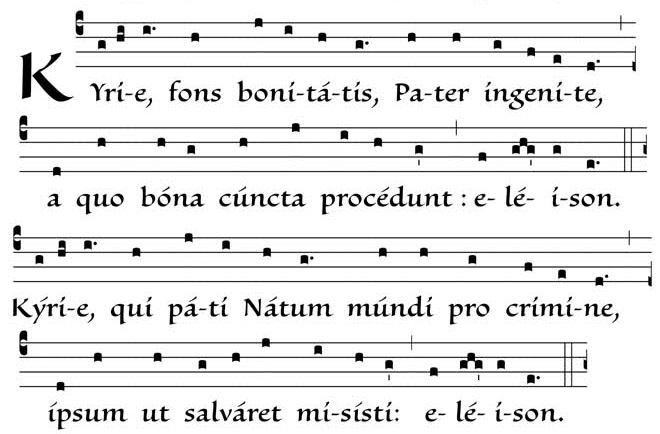 Anfang des Kyrie, fons bonitatis